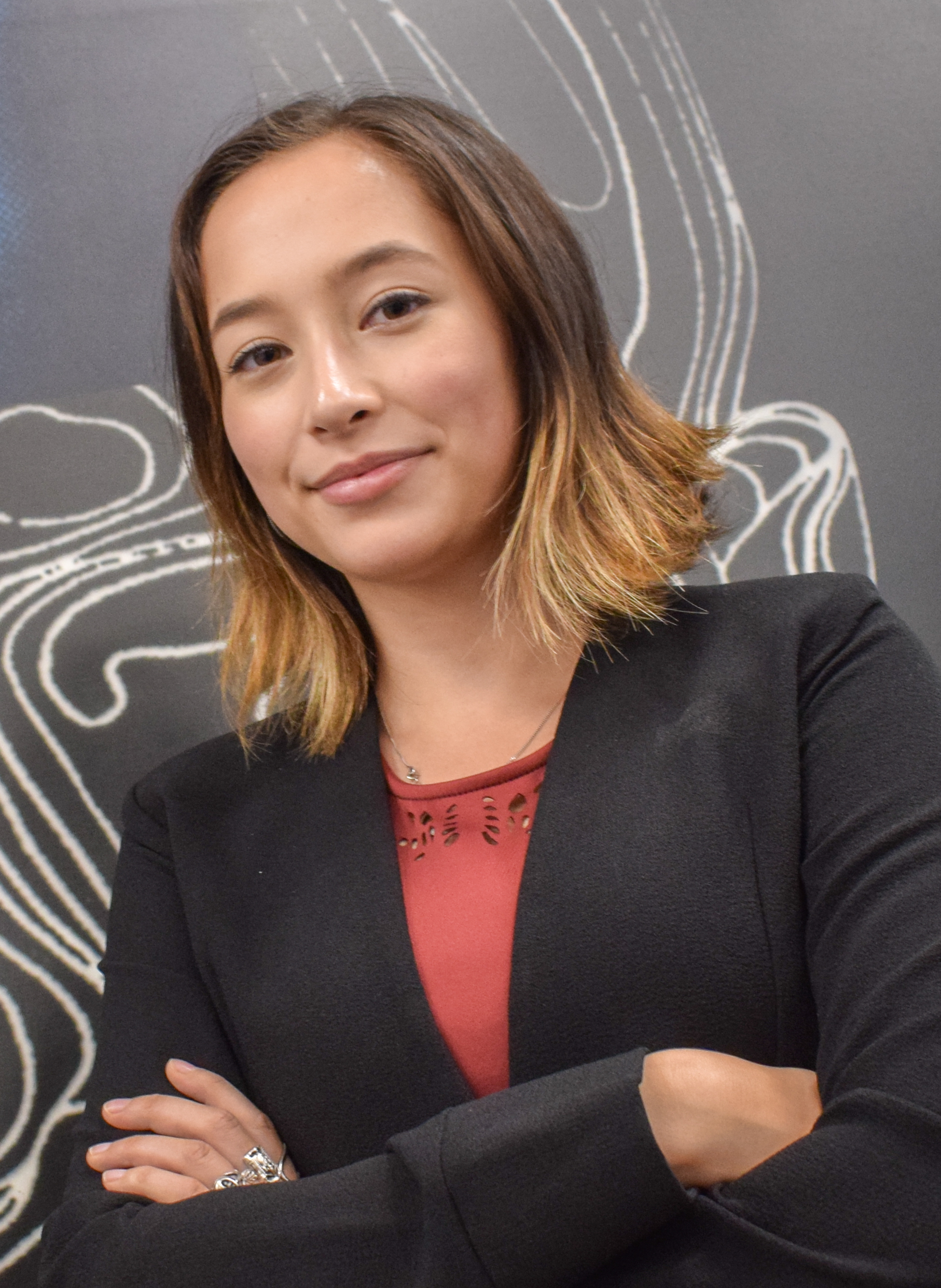 Buenos Aires, 13 de Agosto de 2018._ Como parte del evento Ideas 2018, la canadiense Ann Makosinski impartió una charla sobre sus experiencias en la ciencia y el arte en el INET. Fotos: Kaloian/ Ministerio de Cultura de la Nación.